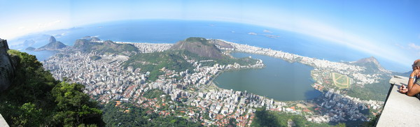 Brasil, Rio de Janeiro, Strand Von Ipanema